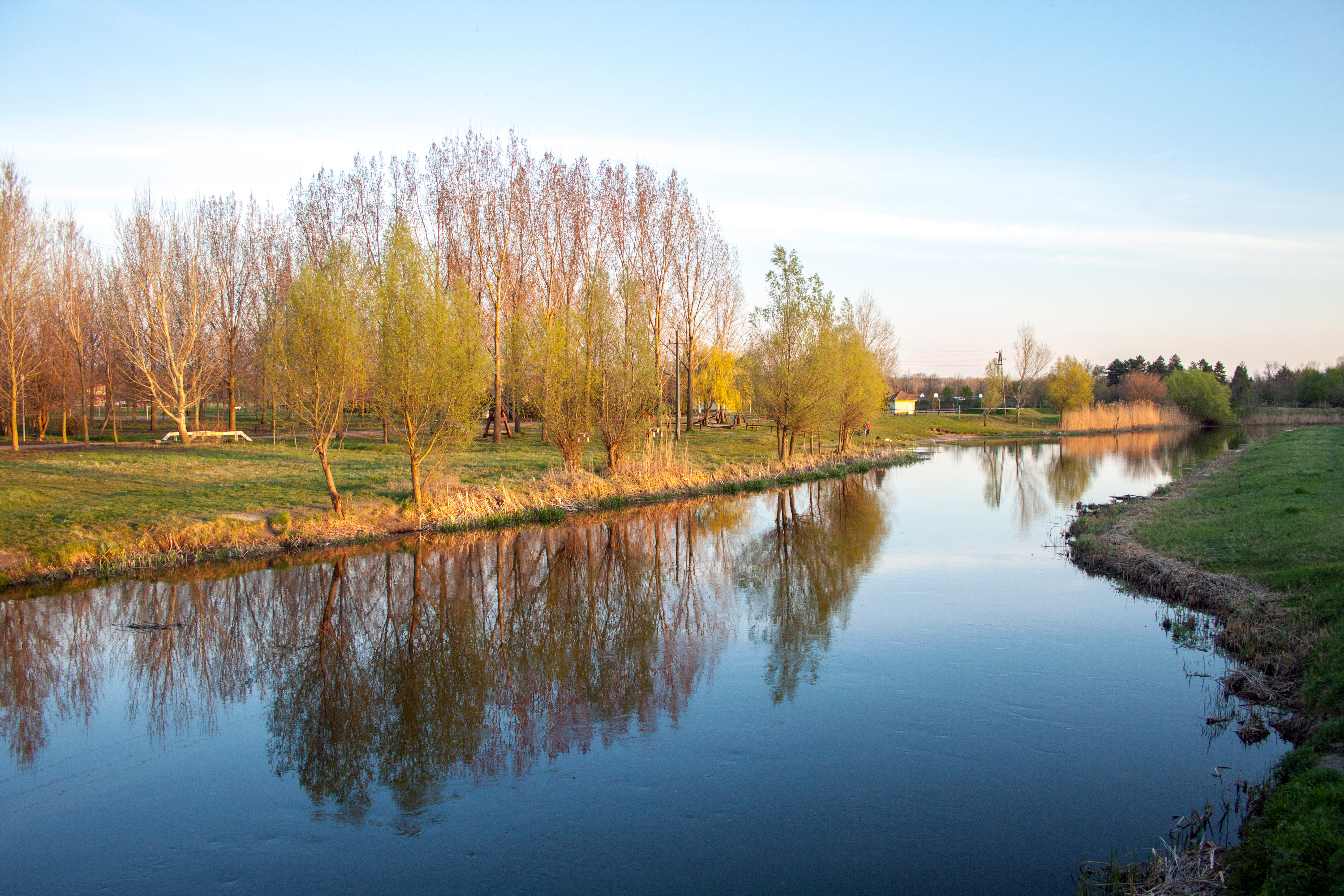 A Duna-völgyi-főcsatorna Érsekcsanádnál